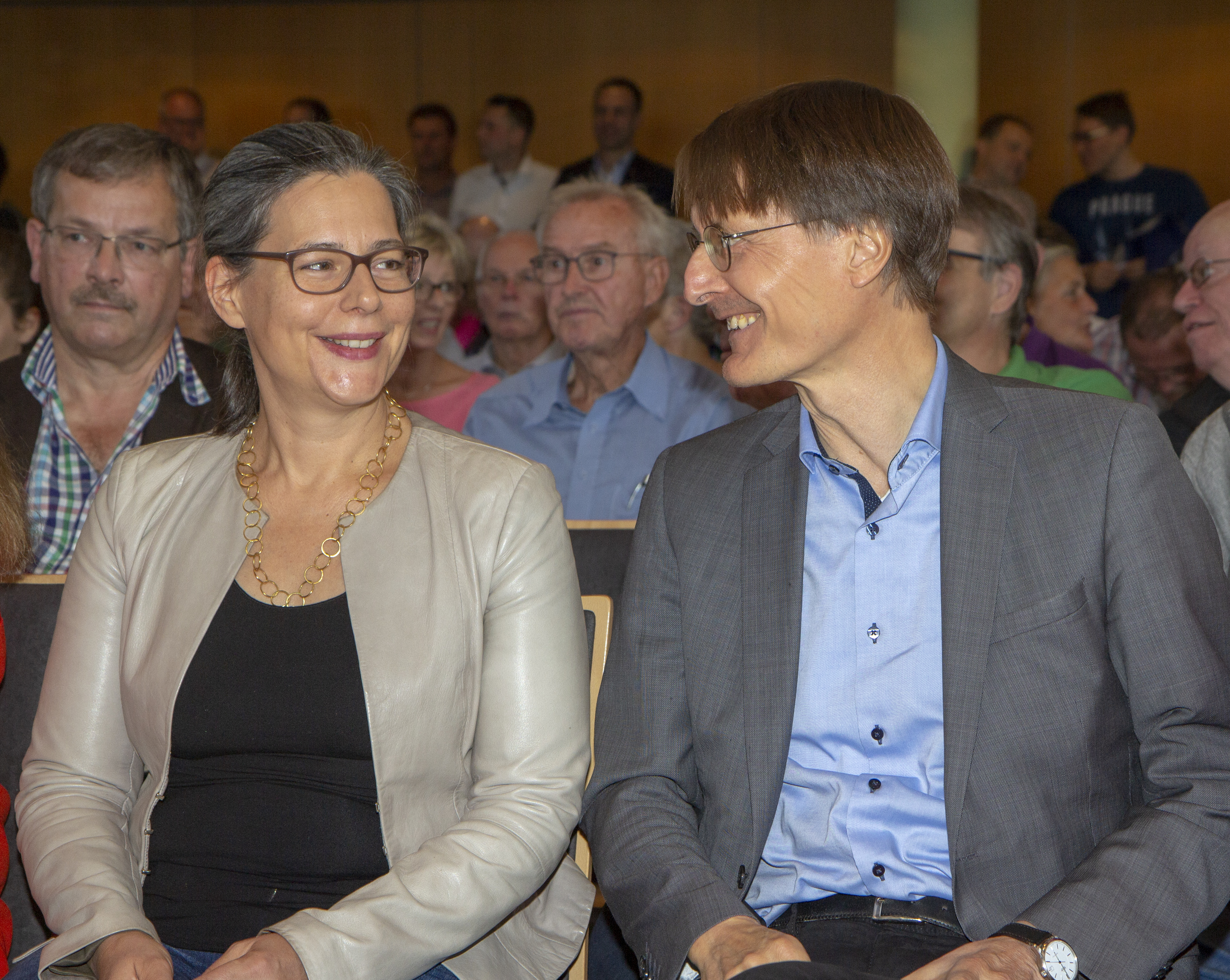 Team Nina Scheer und Karl Lauterbach bei der SPD Regionalkonferenz zur Wahl des SPD-Vorsitzes am 10. September 2019 in Nieder-Olm.